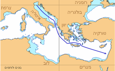 מסלול ההפלגה